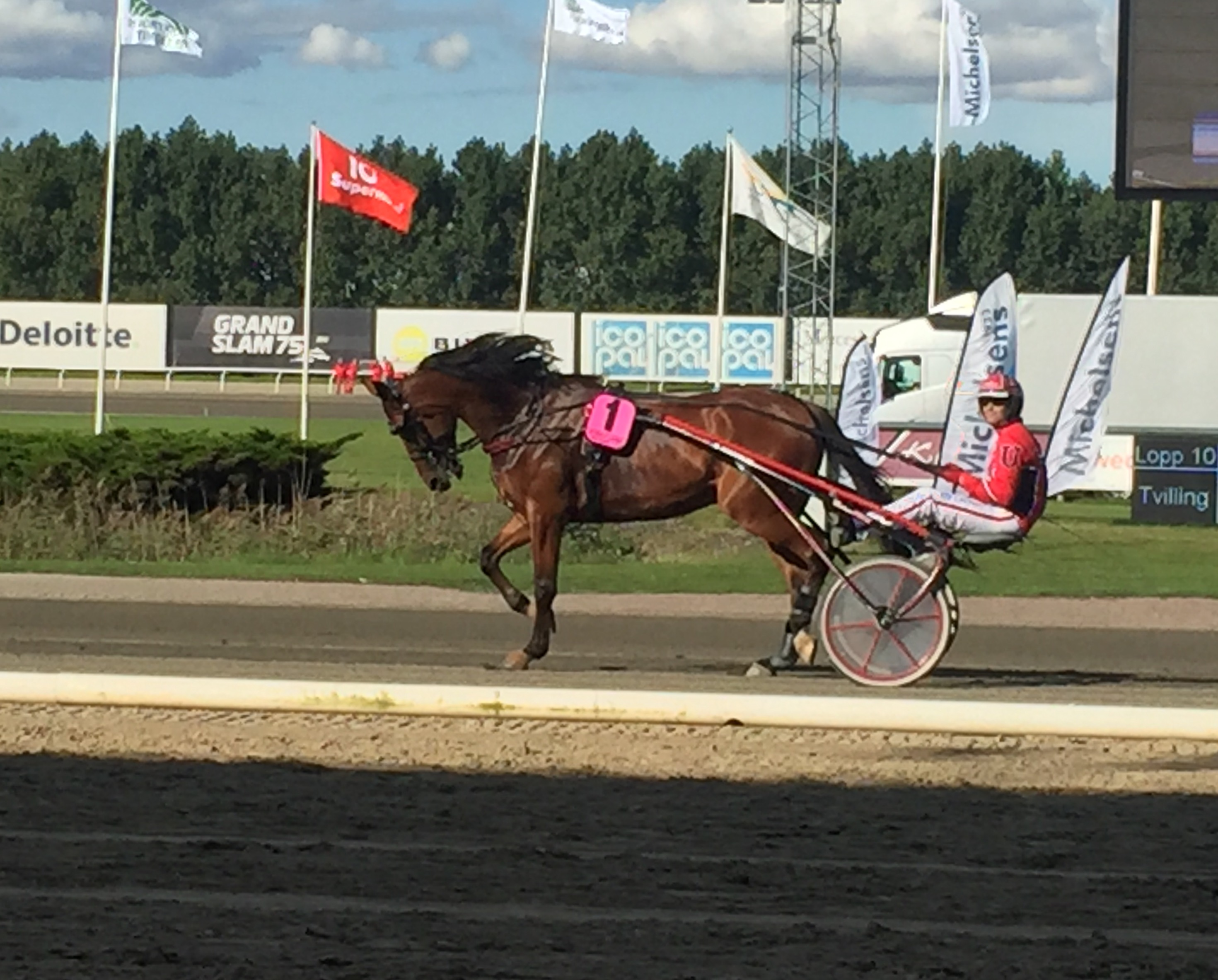 Johan Untersteiner och hästen Cyber Lane inför finalen av Svenskt Travderby 2017.